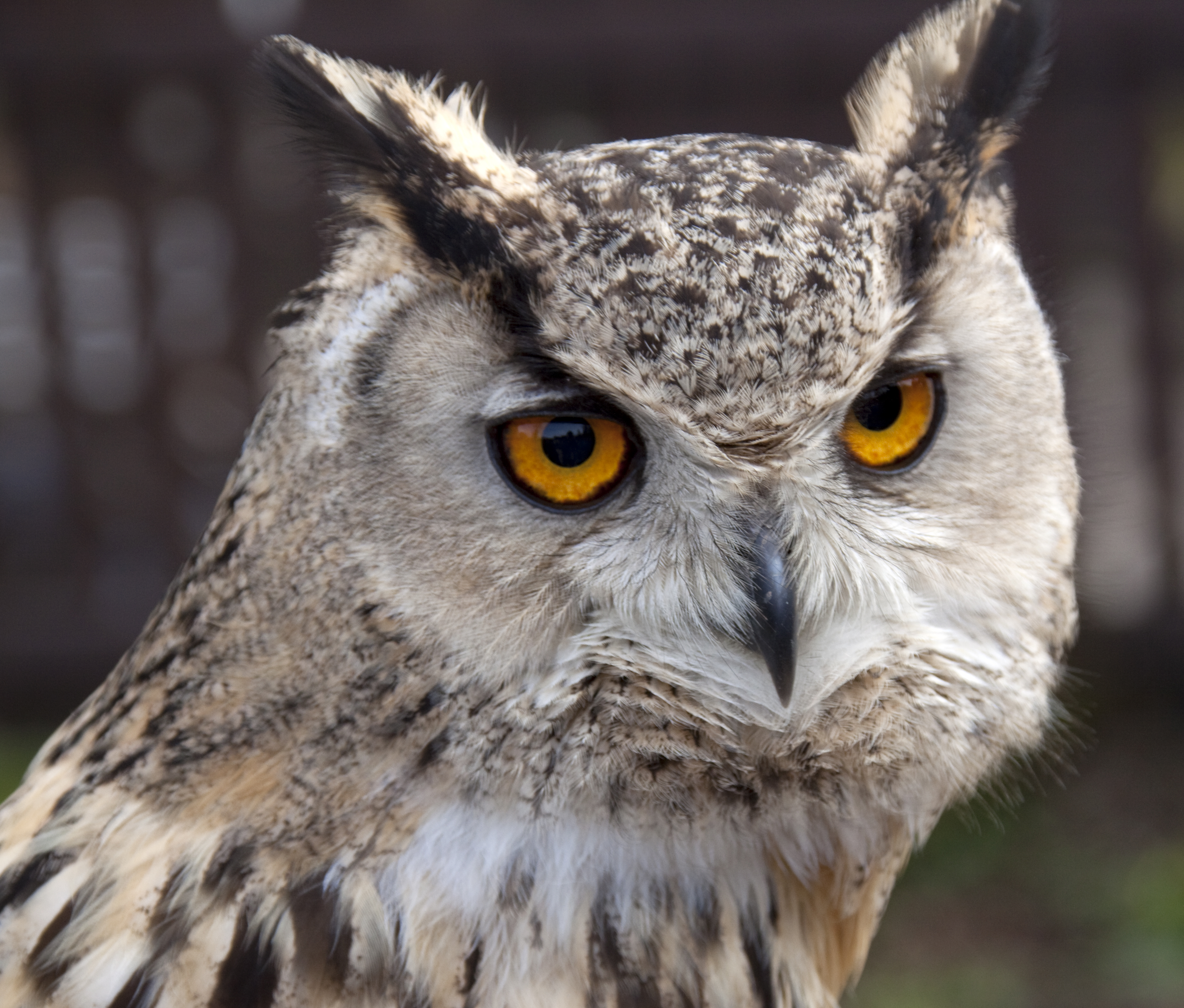 Eagle Owl 1